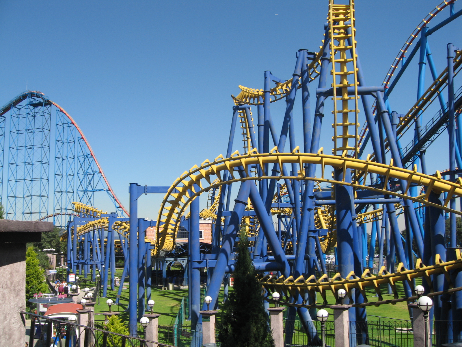 Six Flags México